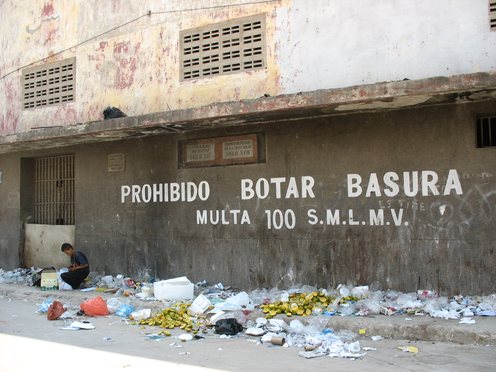 Sitio donde empezó a poblarse Barranquilla